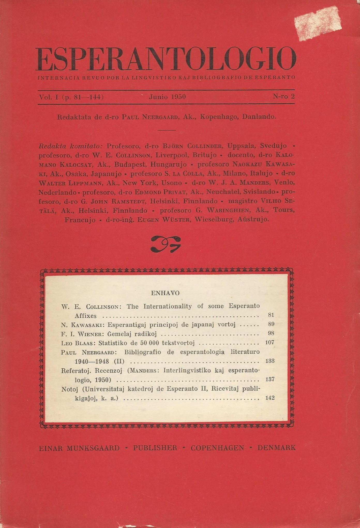 librokovrilo de "Esperantologio", 1950